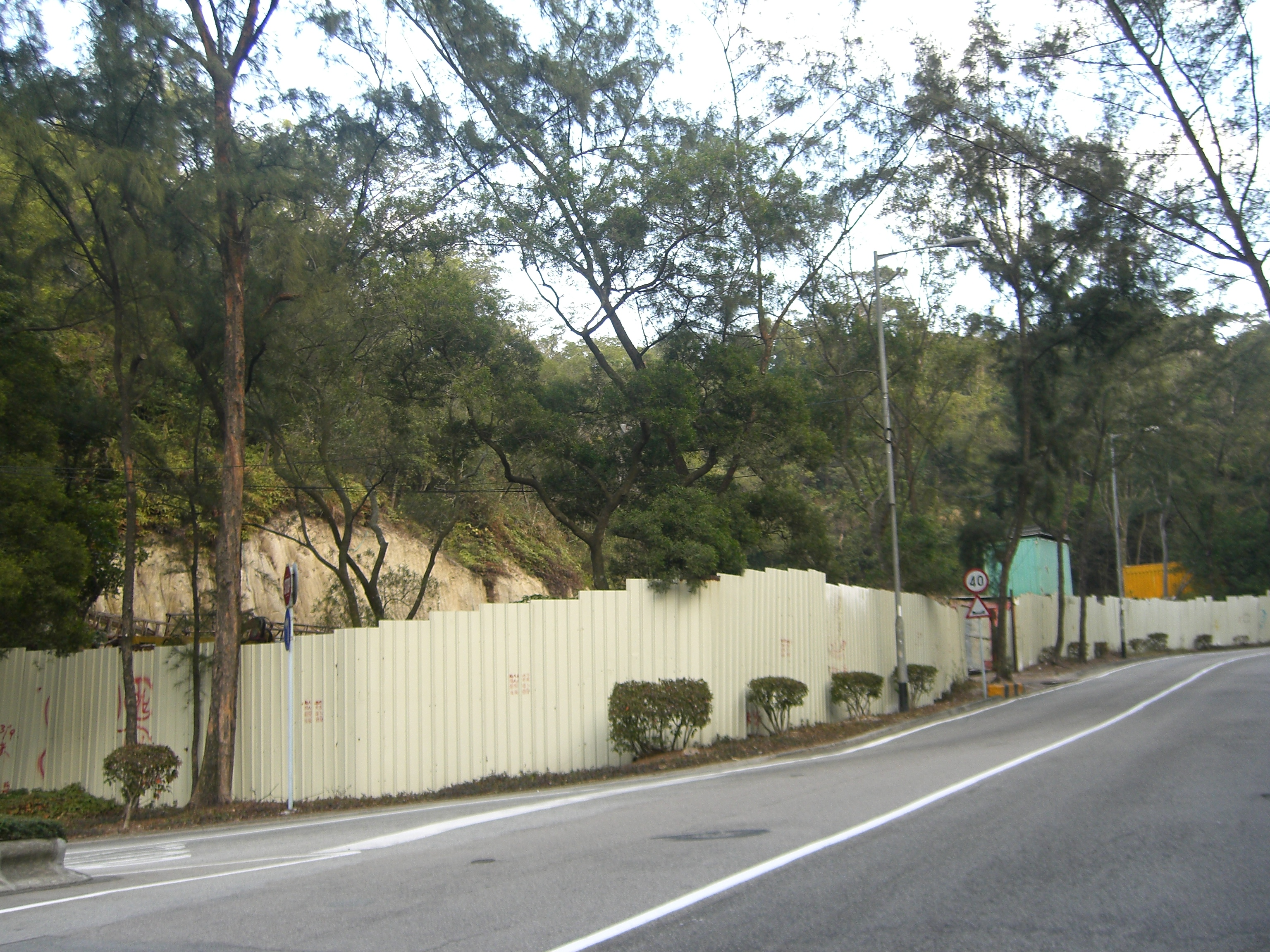 澳門路環黑沙附近的一幅紗紙契地皮